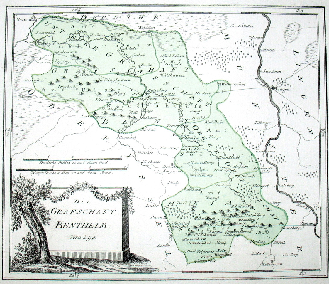 Die Grafschaft Bentheim. Nro. 290. Kolorierter Kupferstich